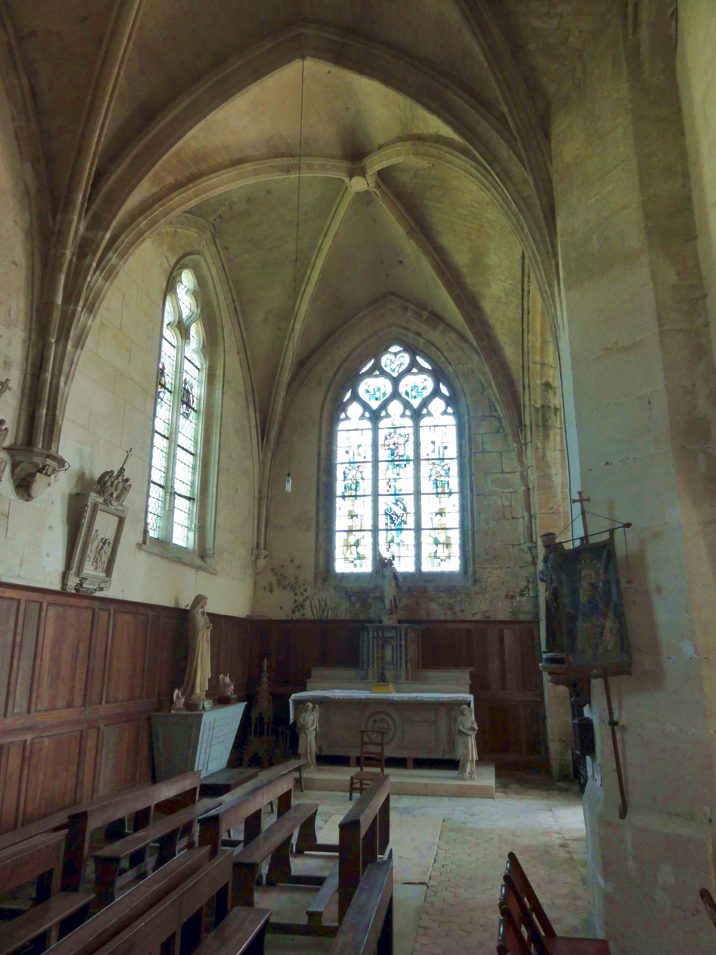 Intérieur de l'église - voir titre.